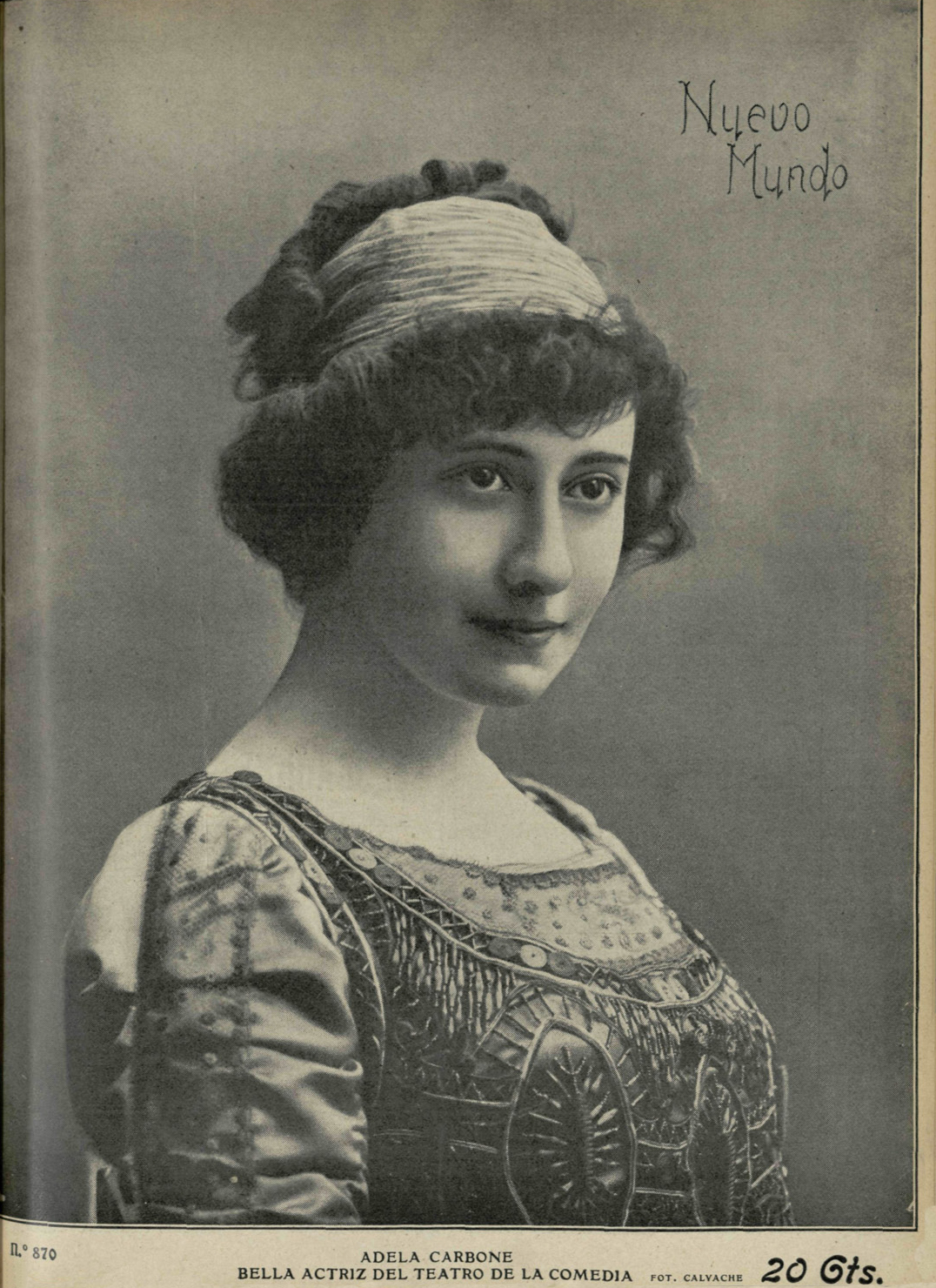 Adela Carbone, bella actriz del Teatro de la Comedia.